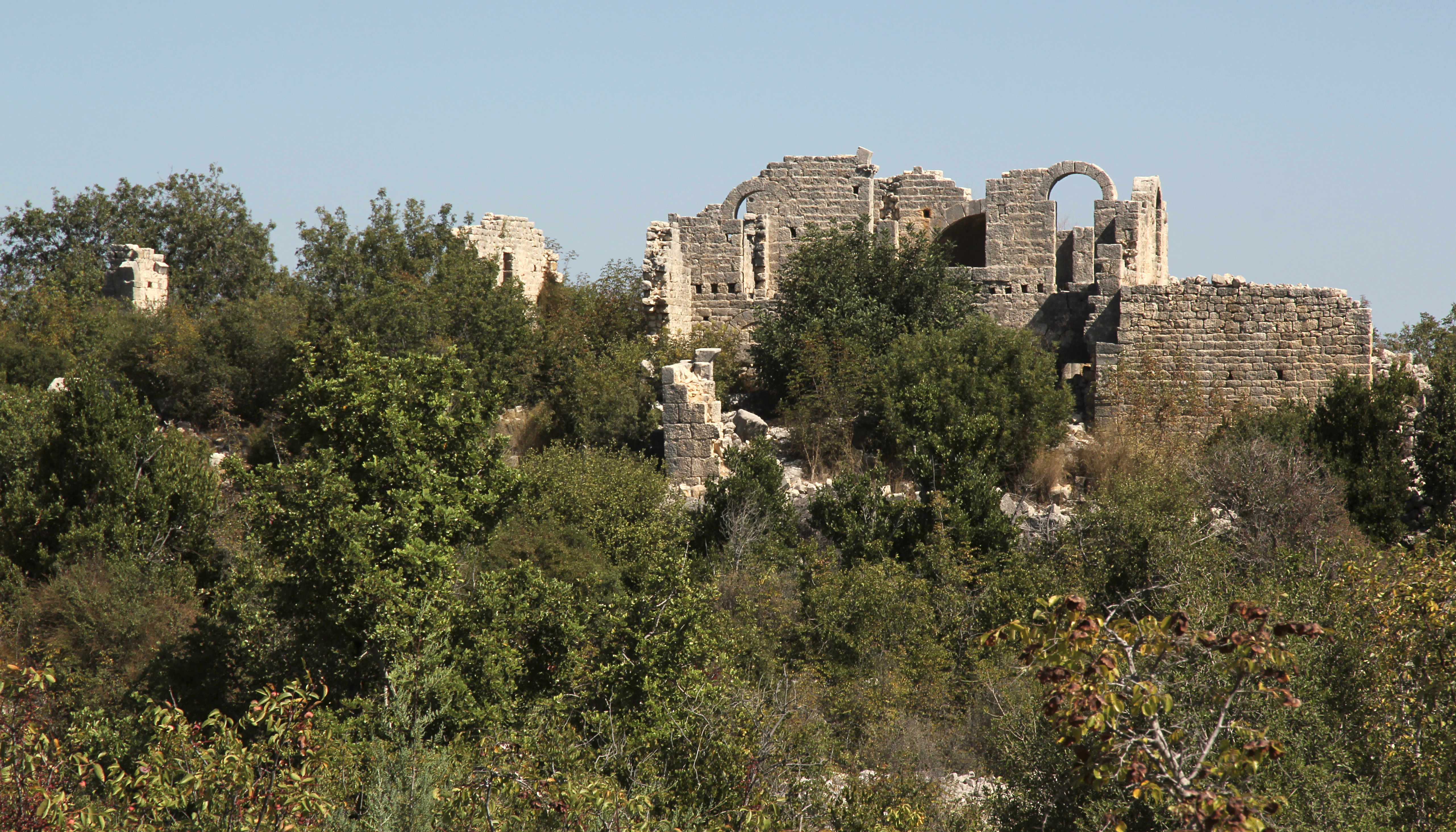 Işıkkale, römisch-byzantinische Kleinstadt im Rauhen Kilikien, Südtürkei, Basilika von Westen